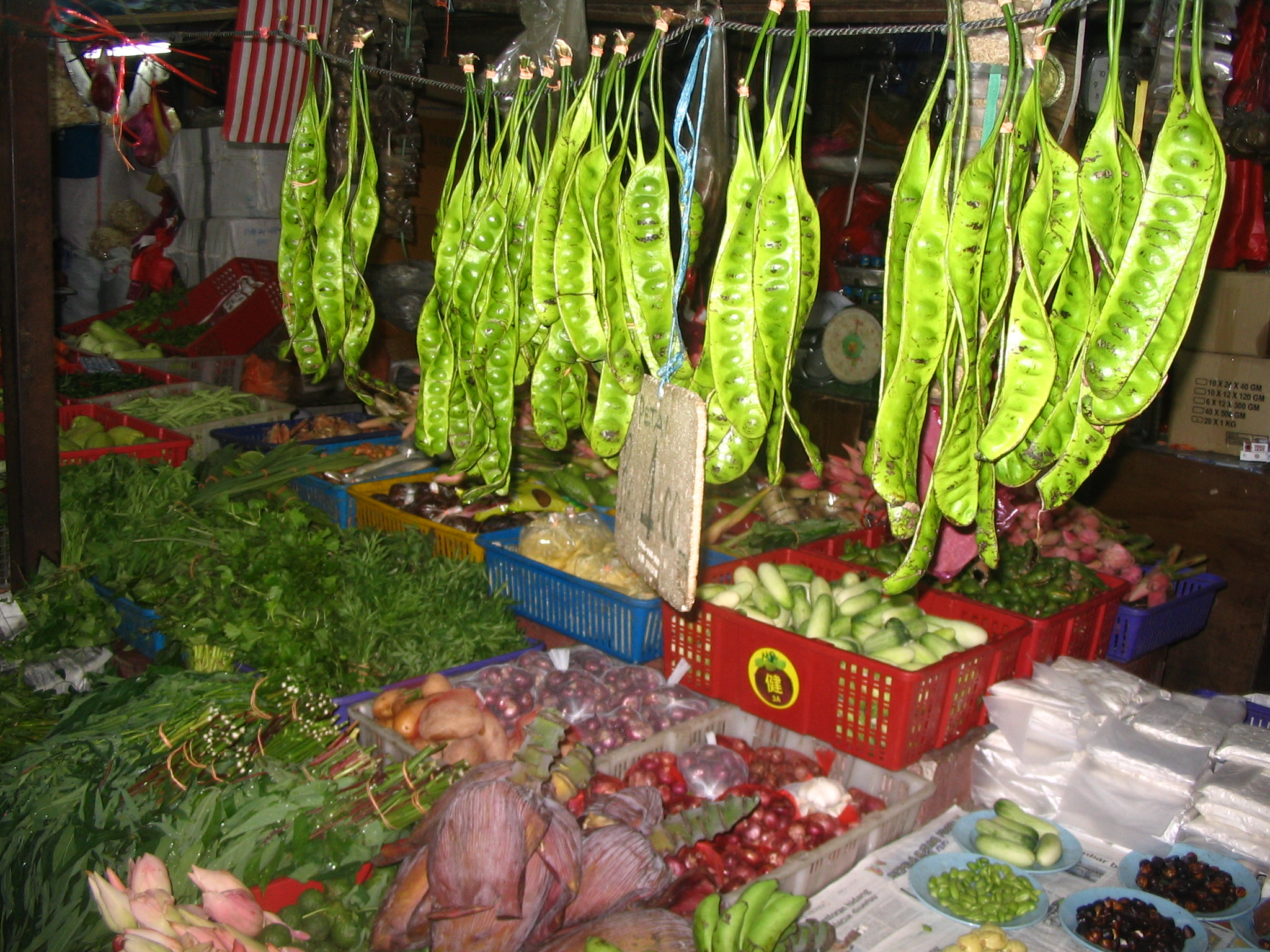 Parkia speciosa - gousses de Petai - Marché de Chow Kit - Kuala Lumpur - Malaisie